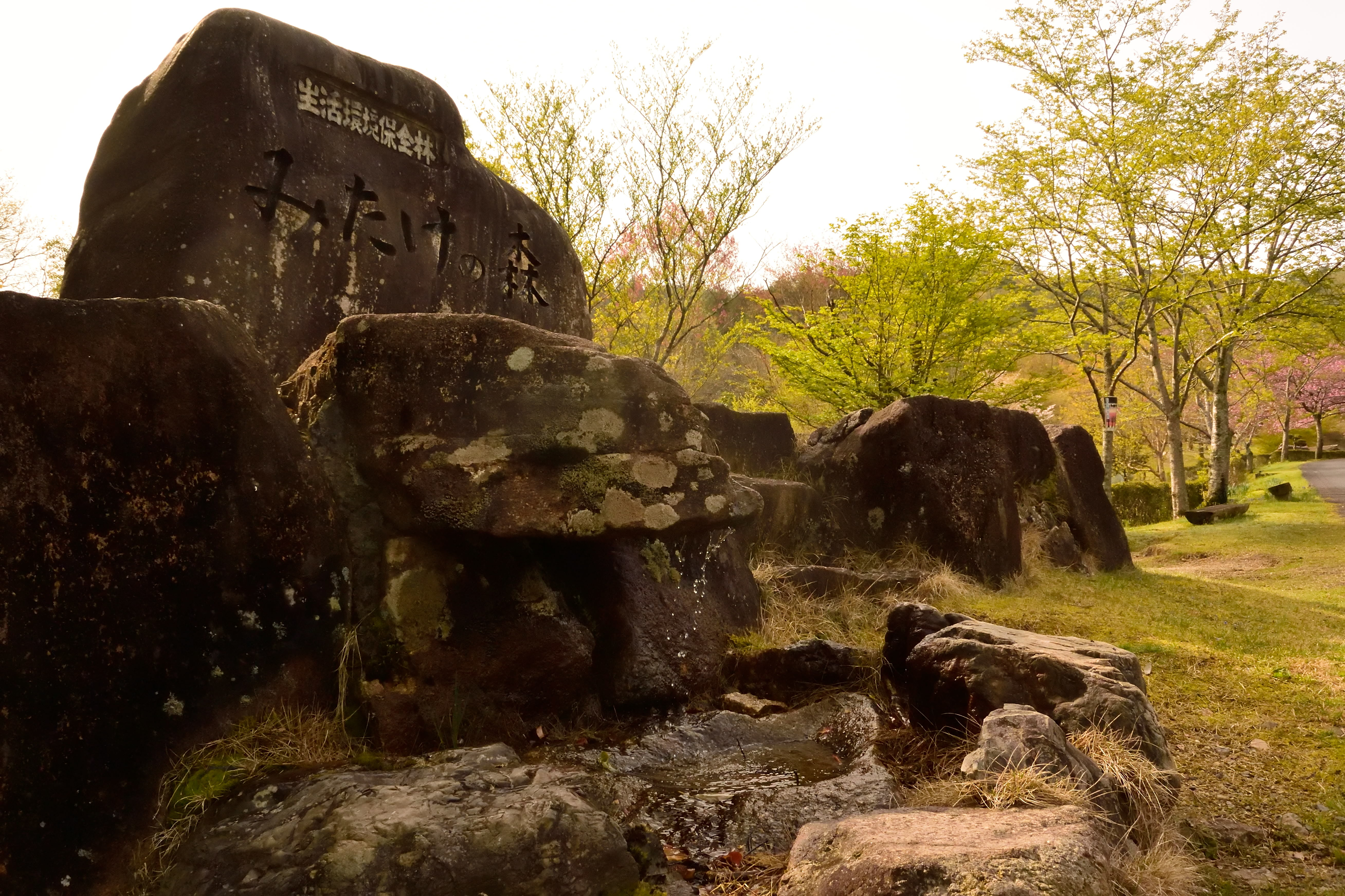 みたけの森石碑